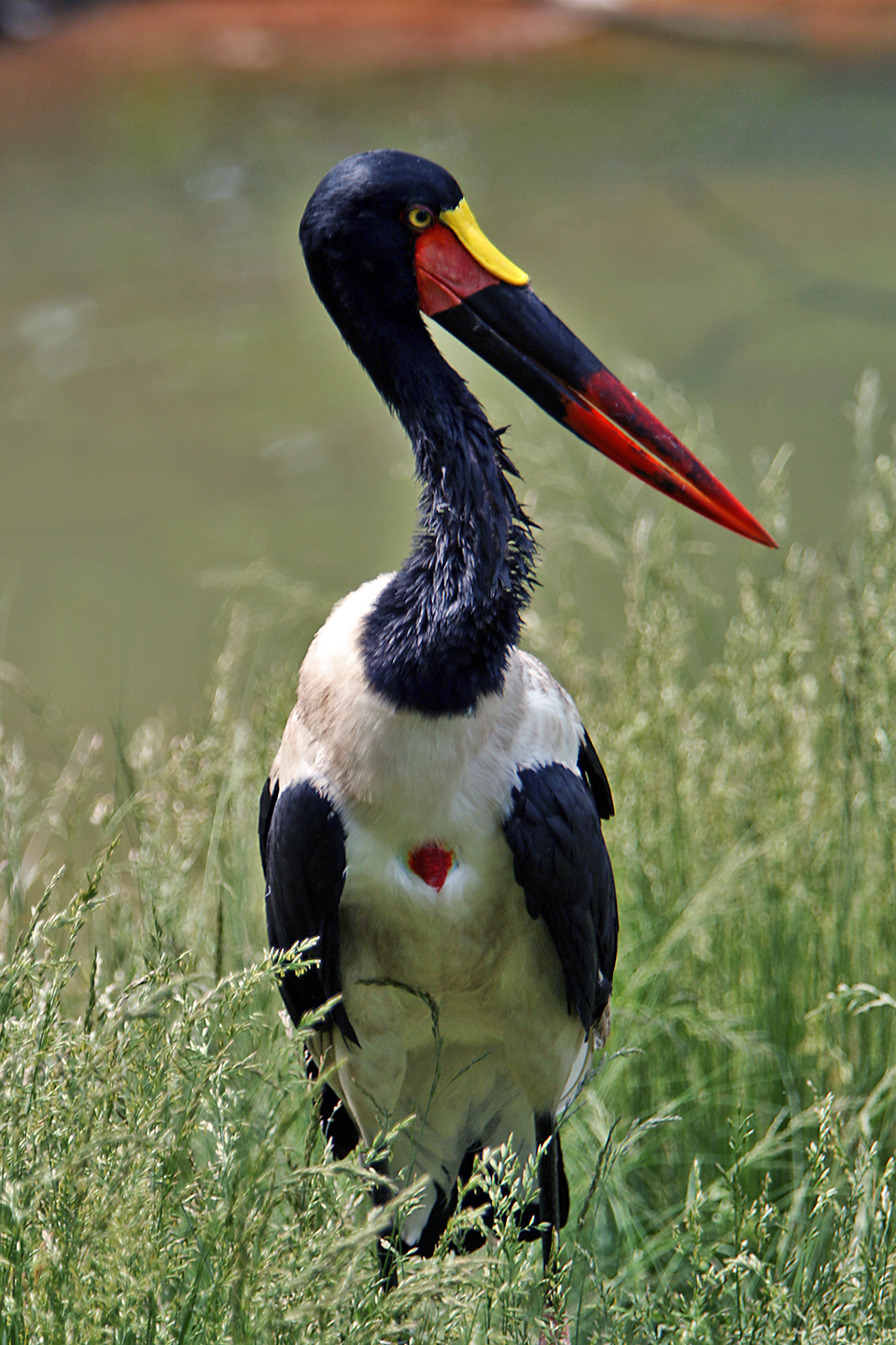 slika 2. Ephippiorhynchus senegalensis.